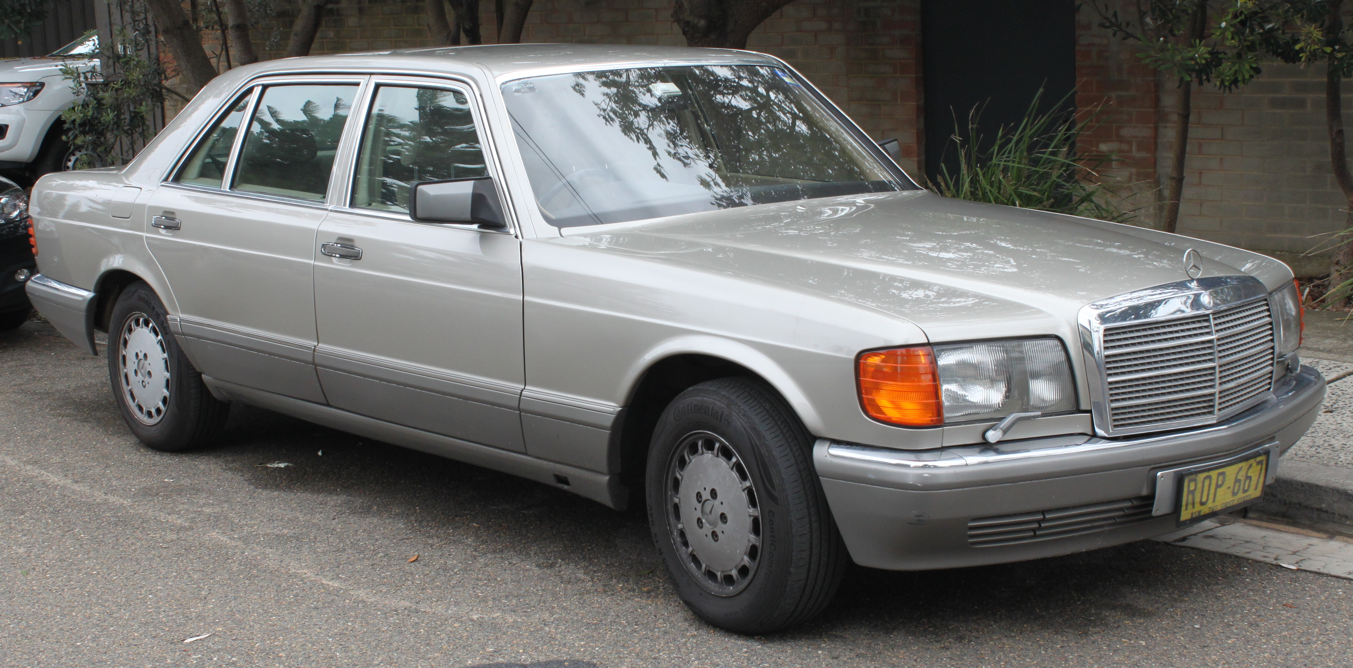 Mercedes Benz W126 560SEL